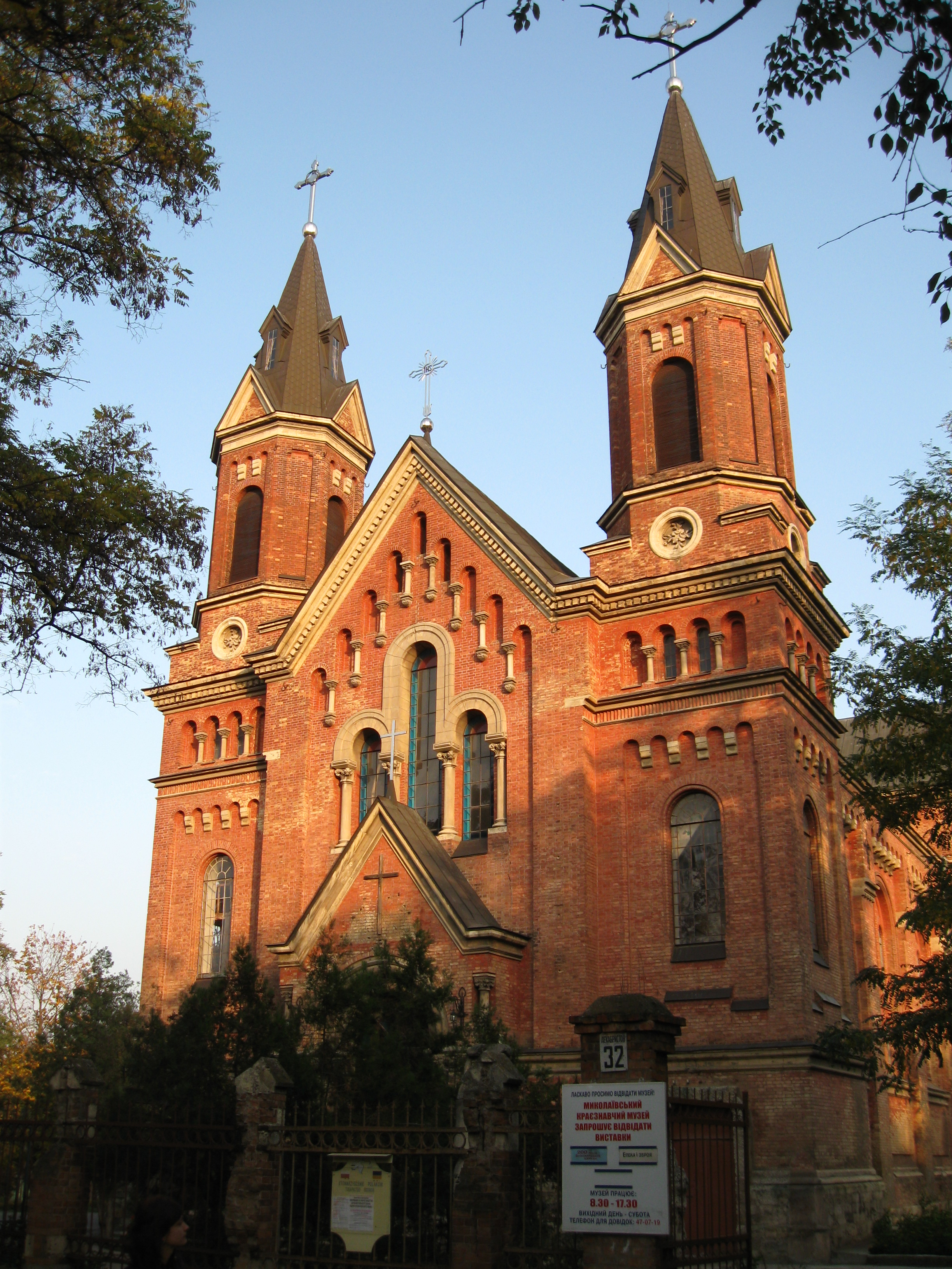 Католицький костьол в Миколаєві